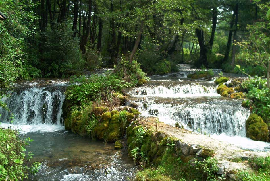 Rijeka Janj.